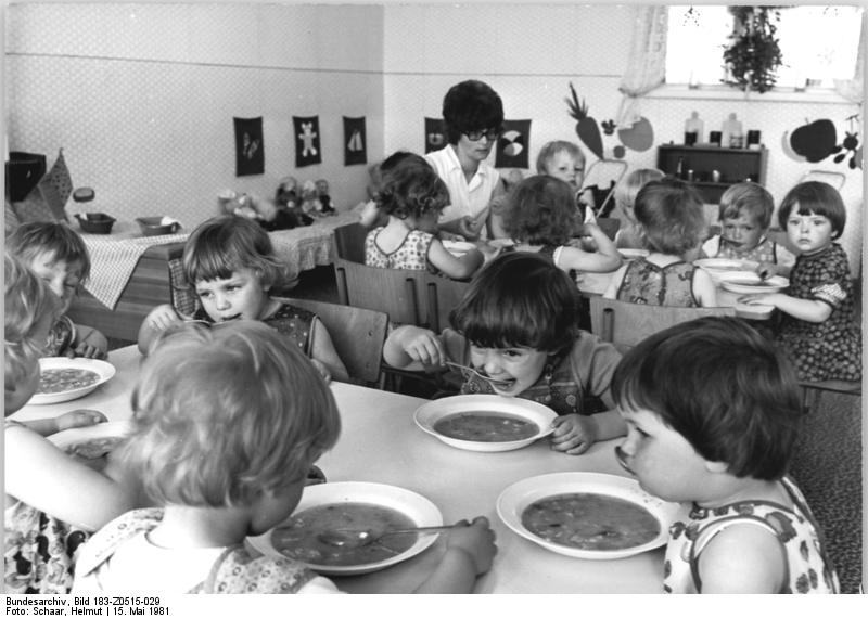 Kaltensundheim, essende Krippenkinder ADN-ZB Schaar 15.5.81 Bez.Suhl-Vor 50 Jahren, am 16. Mai 1931, hatte Ernst Thälmann das Bauernhilfsprogramm der KPD verkündet, das von den Forderungen der verarmten Bauern in der Thön bestimmt wurde. Ein Gedenkstein in Kaltensundheim erinnert seit einigen Jahren an die Klassenkämpfe der Rhönbauern. Heute bestimmen leistungsfähige Betriebe in Industrie und Landwirtschaft, zweckmäßige Einrichtungen der Volksbildung, des Gesundheitswesens und der Kultur das Bild der Dörfer. Die 1976 übergebene Kinderkrippe in Kaltensundheim ist Domizil für 58 Kleinkinder. -siehe auch Z 0151-28N, 30N